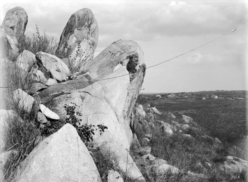 Tabora, Landschaftsbild